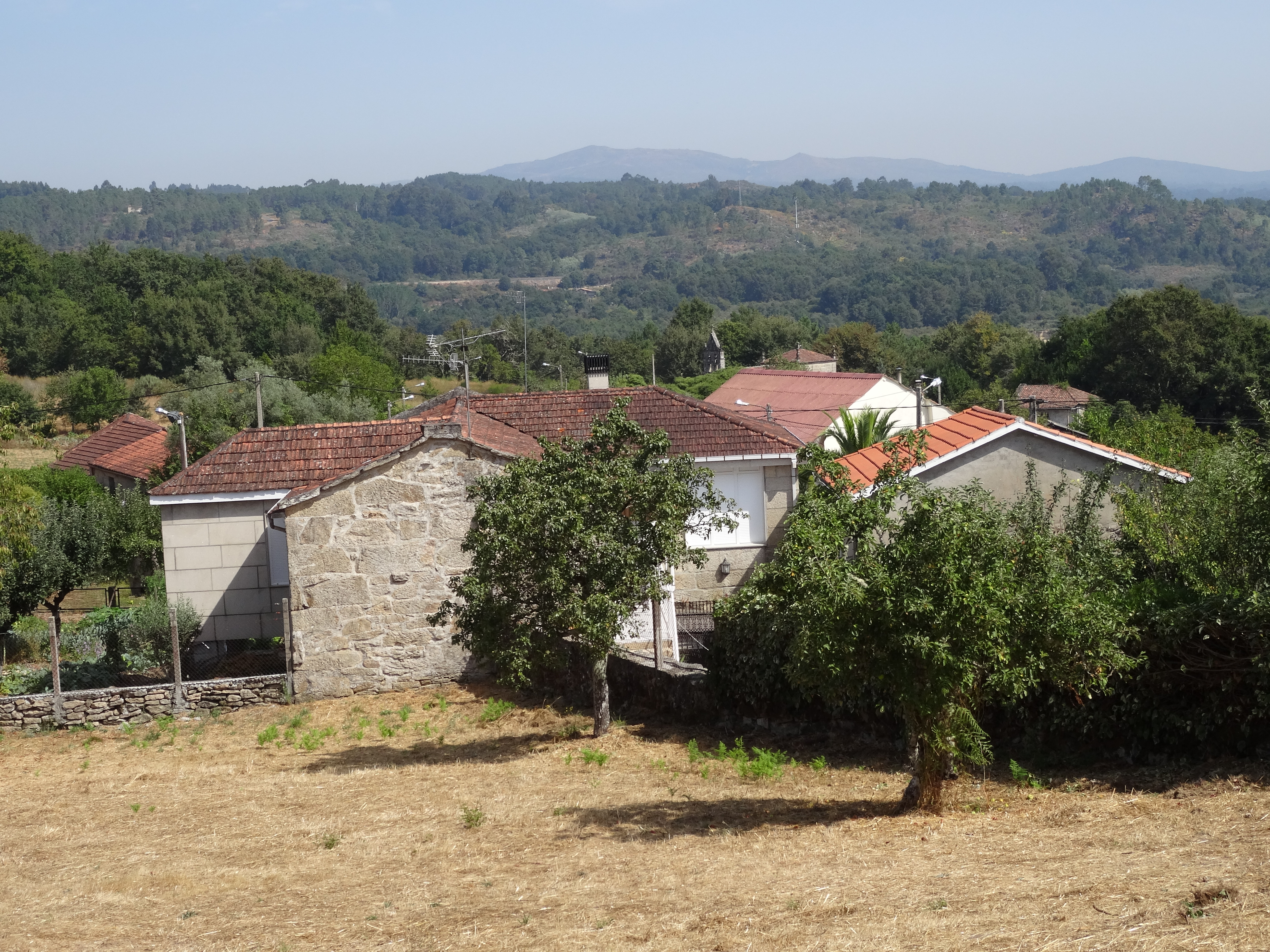 Ver título.